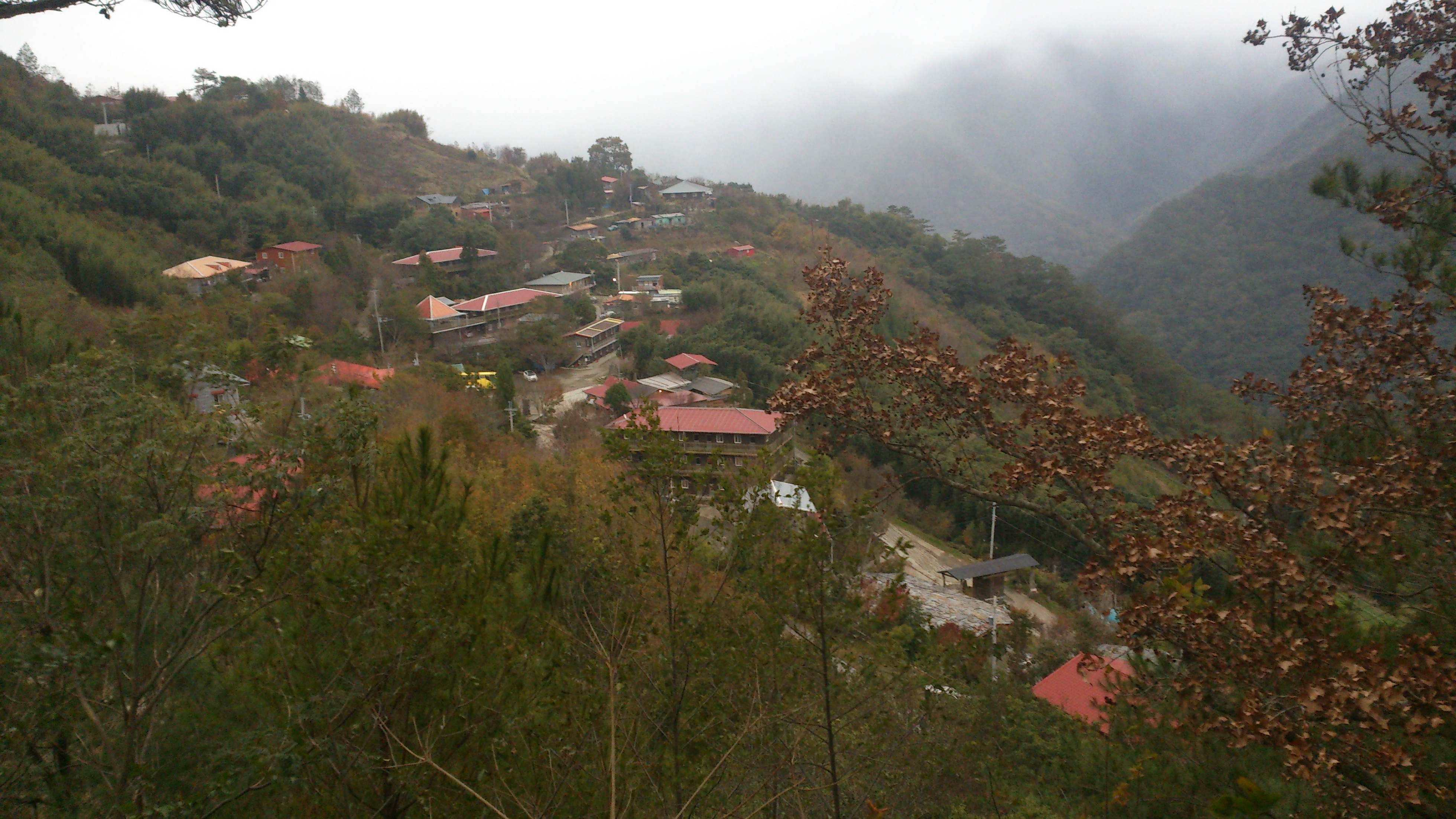 司馬庫斯 Smangus